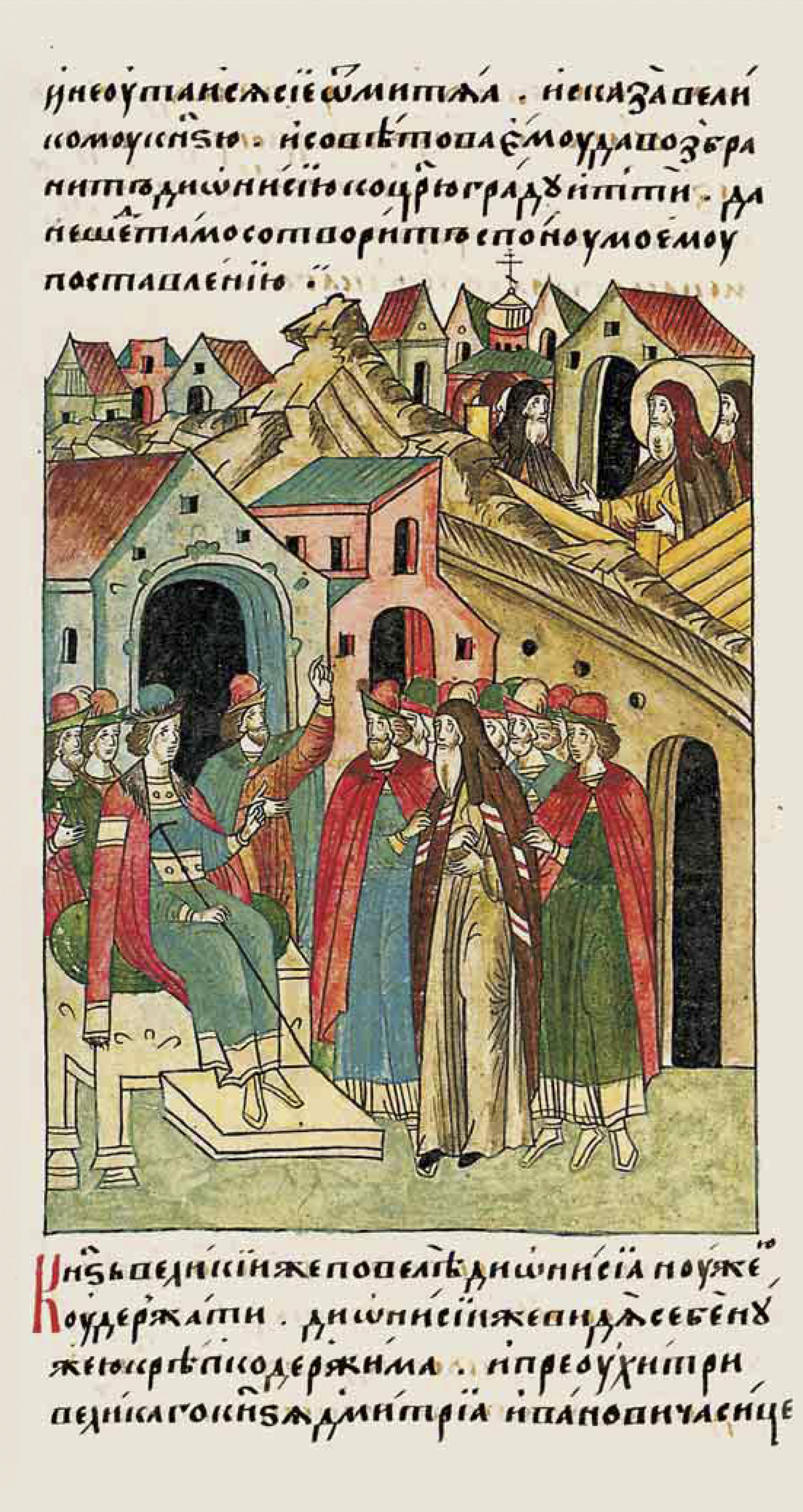 Митяй (Михаил) и свт. Дионисий перед вел. кн. Димитрием Донским. Миниатюра из Лицевого летописного свода. 70-е гг. XVI в. (БАН. 31.7. 30-1. Л. 766 об.) не скрылось его желание от Митяя, и он посоветовал великому князю: «Запрети Дионисию ехать в Царьград, чтобы он там не навредил моему избранию». Князь великий повелел насильно задержать Дионисия. Дионисий, видя, что его насильно удерживают, решил перехитрить великого князя Дмитрия Ивановича, [сказав ему: «Отпусти меня и разреши мне жить, как я хочу, а в Царьград я не пойду без твоего разрешения. Будет поручателем в этом за меня преподобный игумен Сергий Радонежский». Князь великий послушал его и, поверив словам Дионисия, устыдился его поручателя и отпустил епископа Суздальского Дионисия, взяв с него слово, что он не поедет]